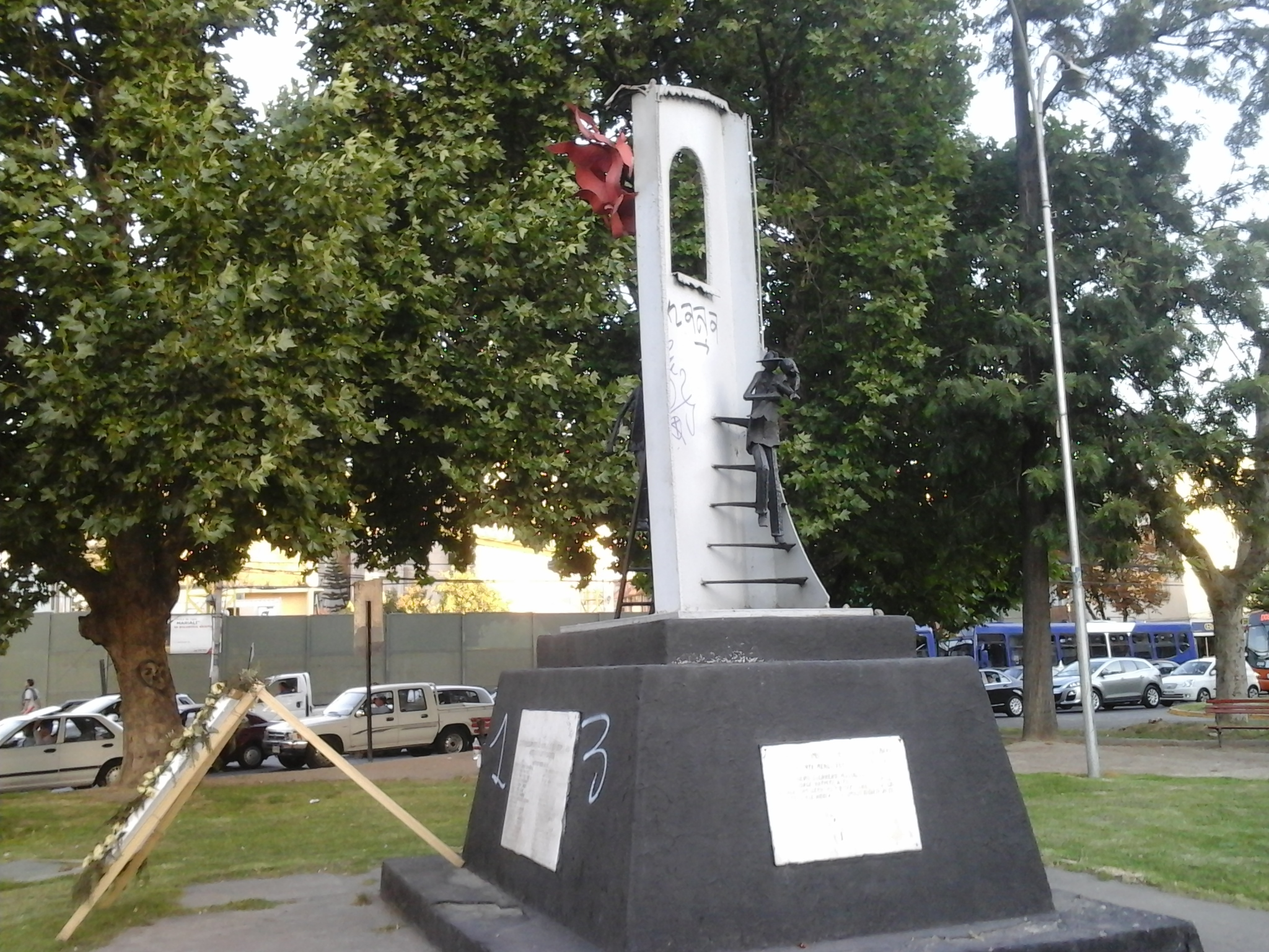 Plaza Armenia sector sur, monumento a los bomberos